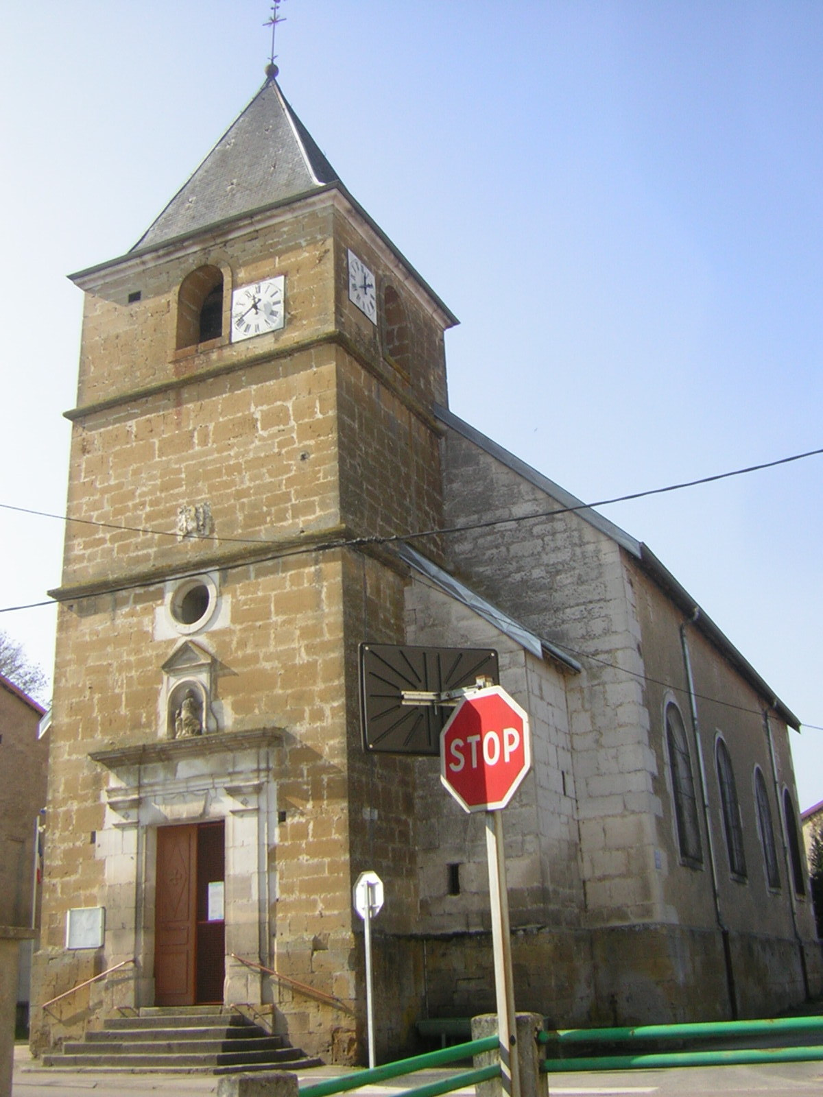 Église paroissiale Sainte-Libaire de Burey en Vaux (55140)